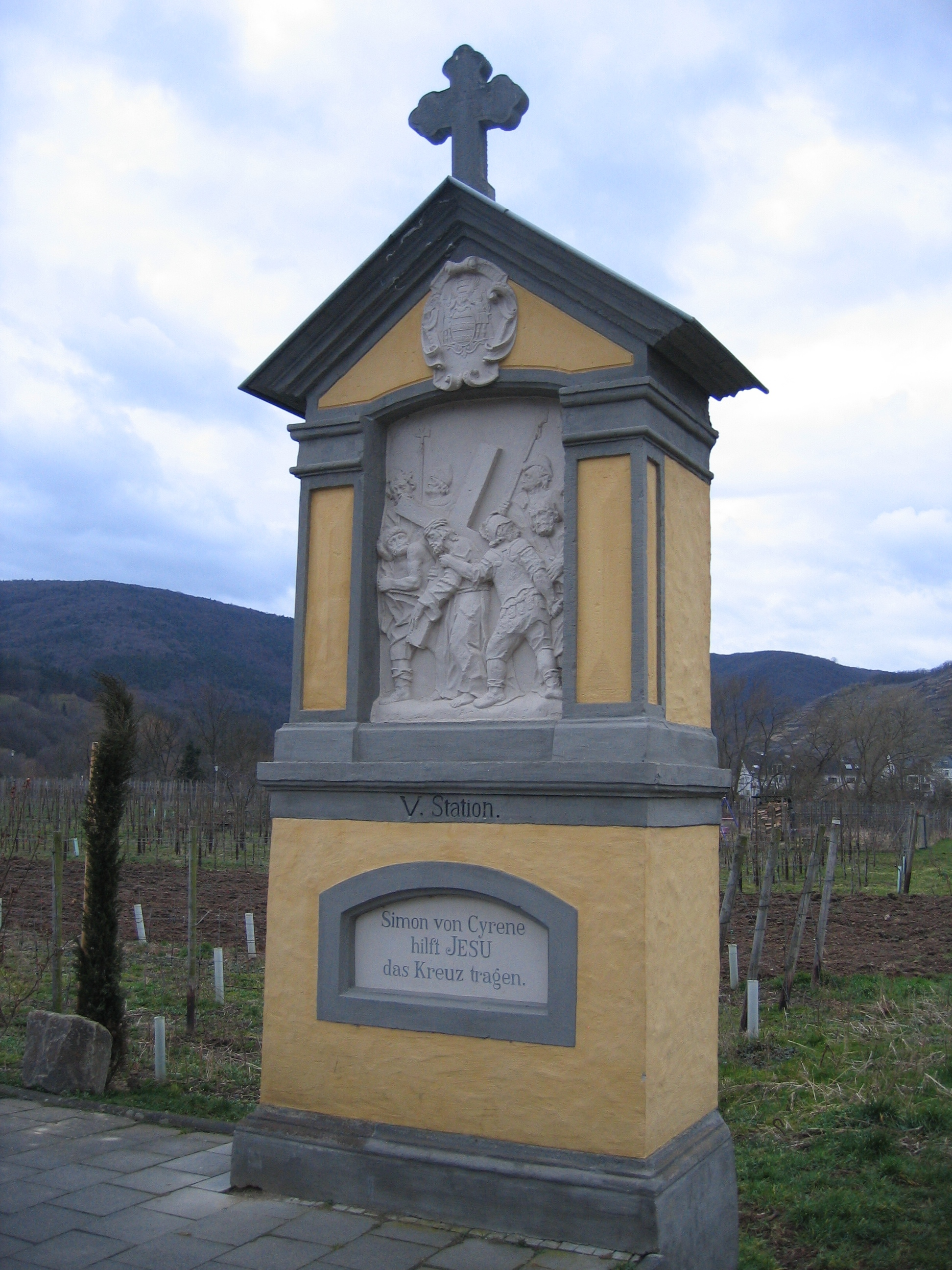 Eine der Stationen des Kreuzweges des Kalvarienbergs in Bad Neuenahr-Ahrweiler